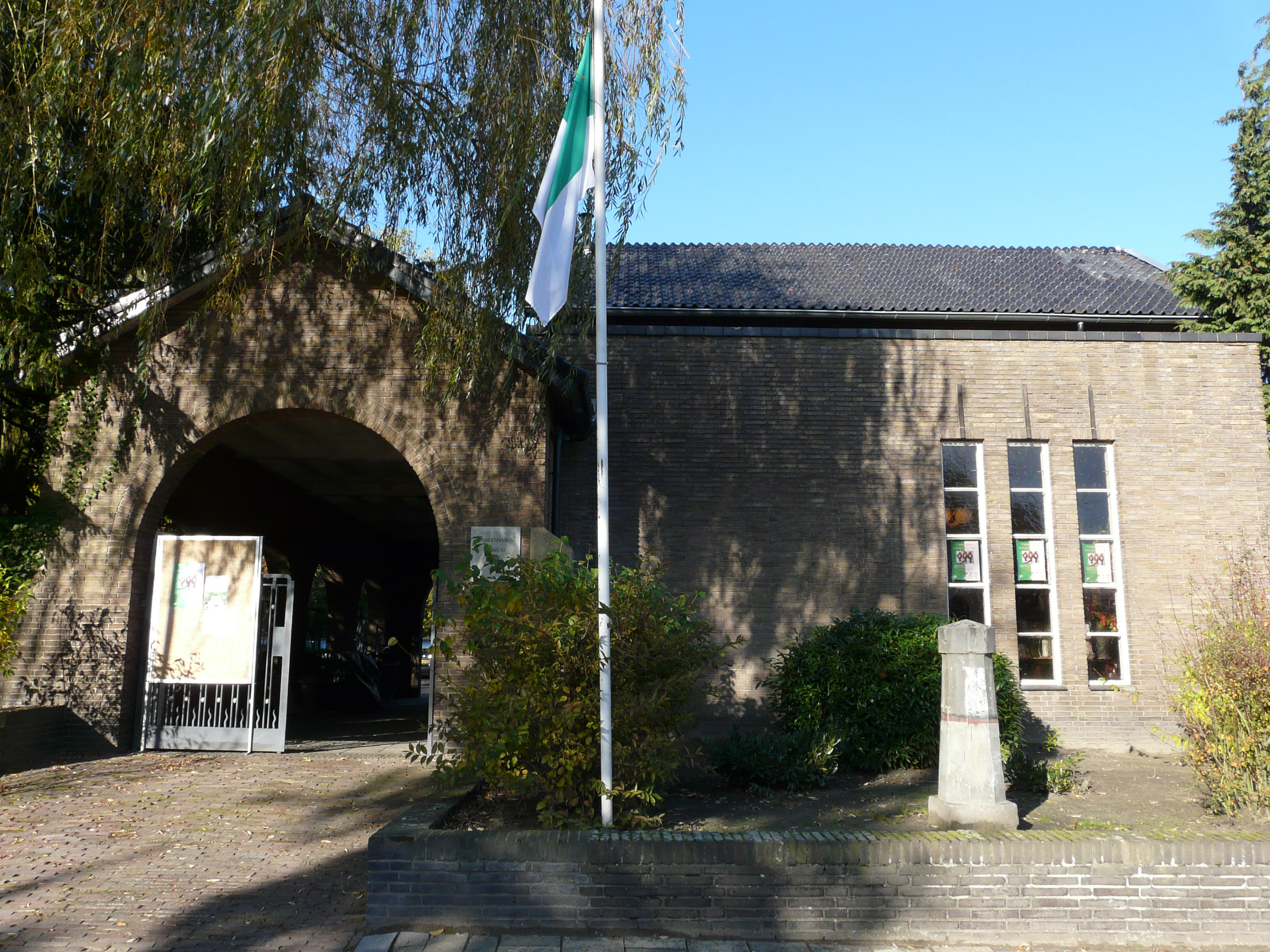 Zicht op een deel van het voormalige Princenhaags Museum aan de Haagweg 334bis in Princenhage